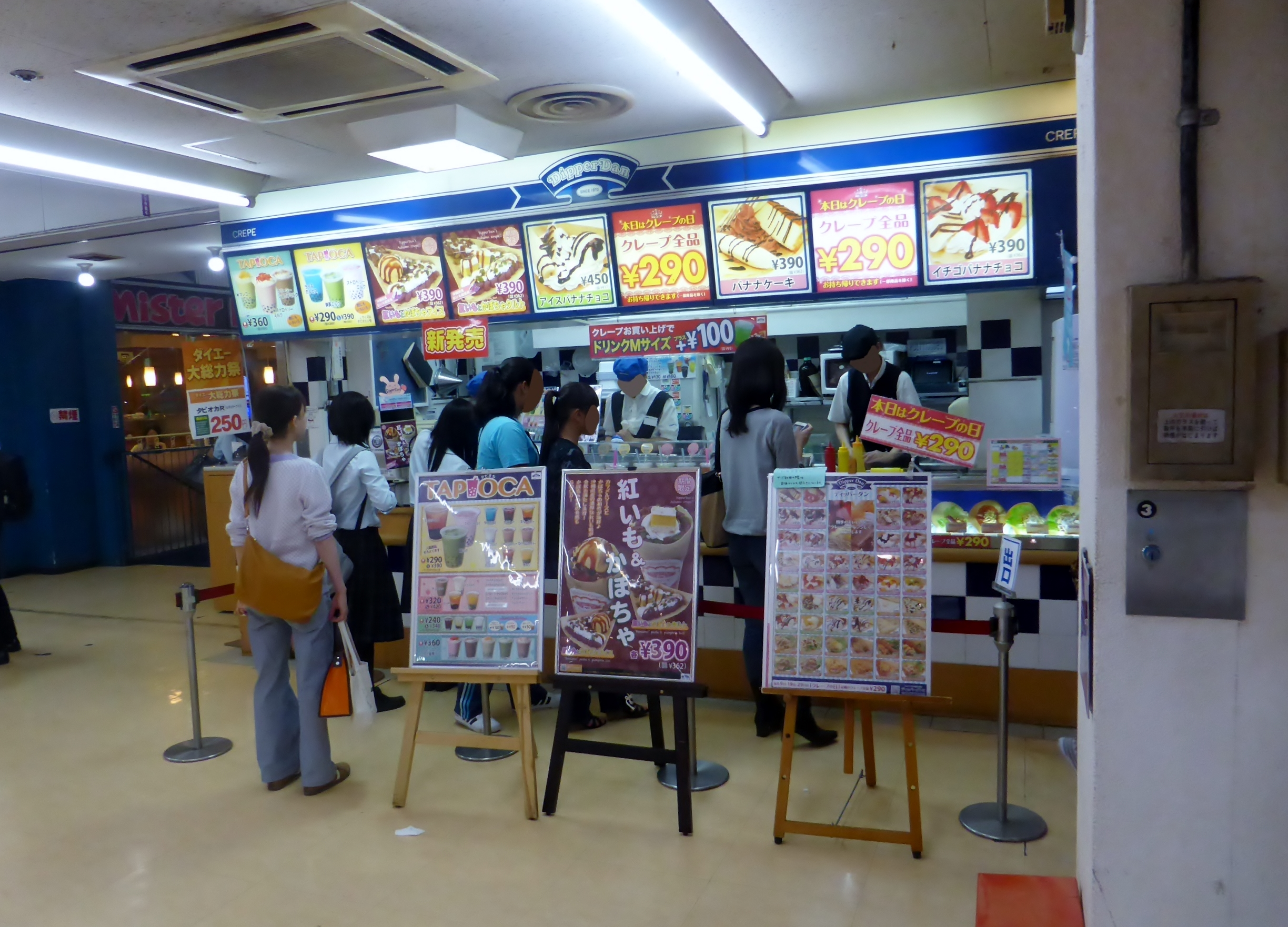 ディッパーダン京橋店を撮影。